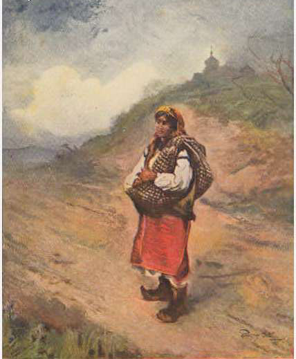 Гуцулка з бесагами, робота Северина Обста